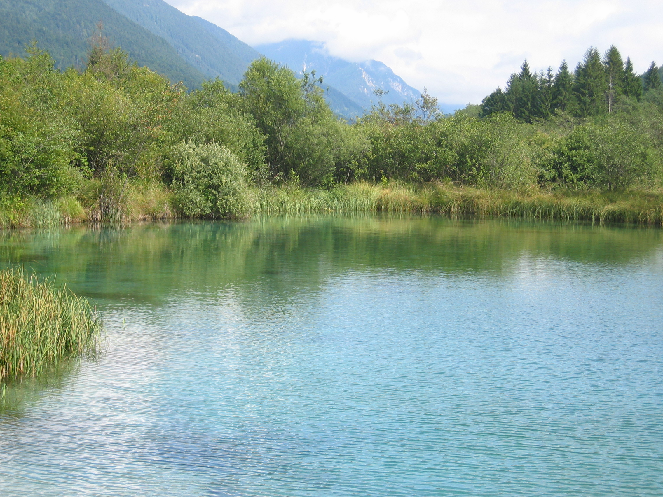 Zelenci, izvir Save Dolinke. izdelal: --Ziga 19:09, 30 september 2005 (CEST)